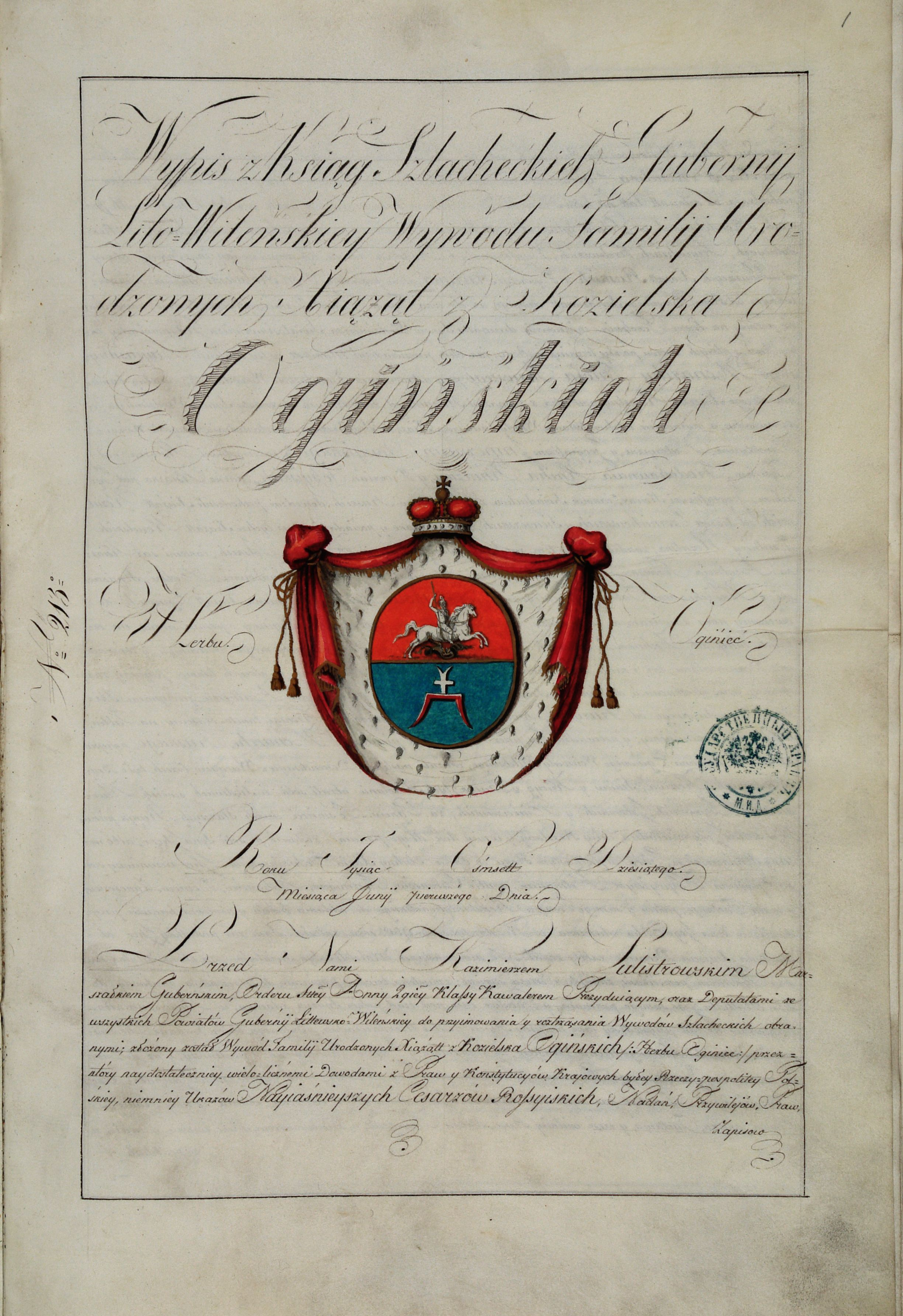 Беларуская (тарашкевіца): Герб князёў Агінскіх (Aginski)